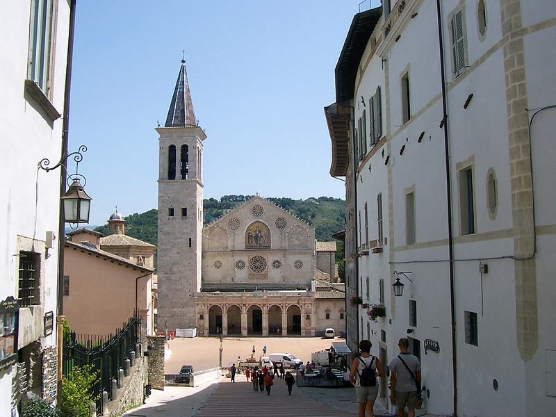 Spoleto - Duomo